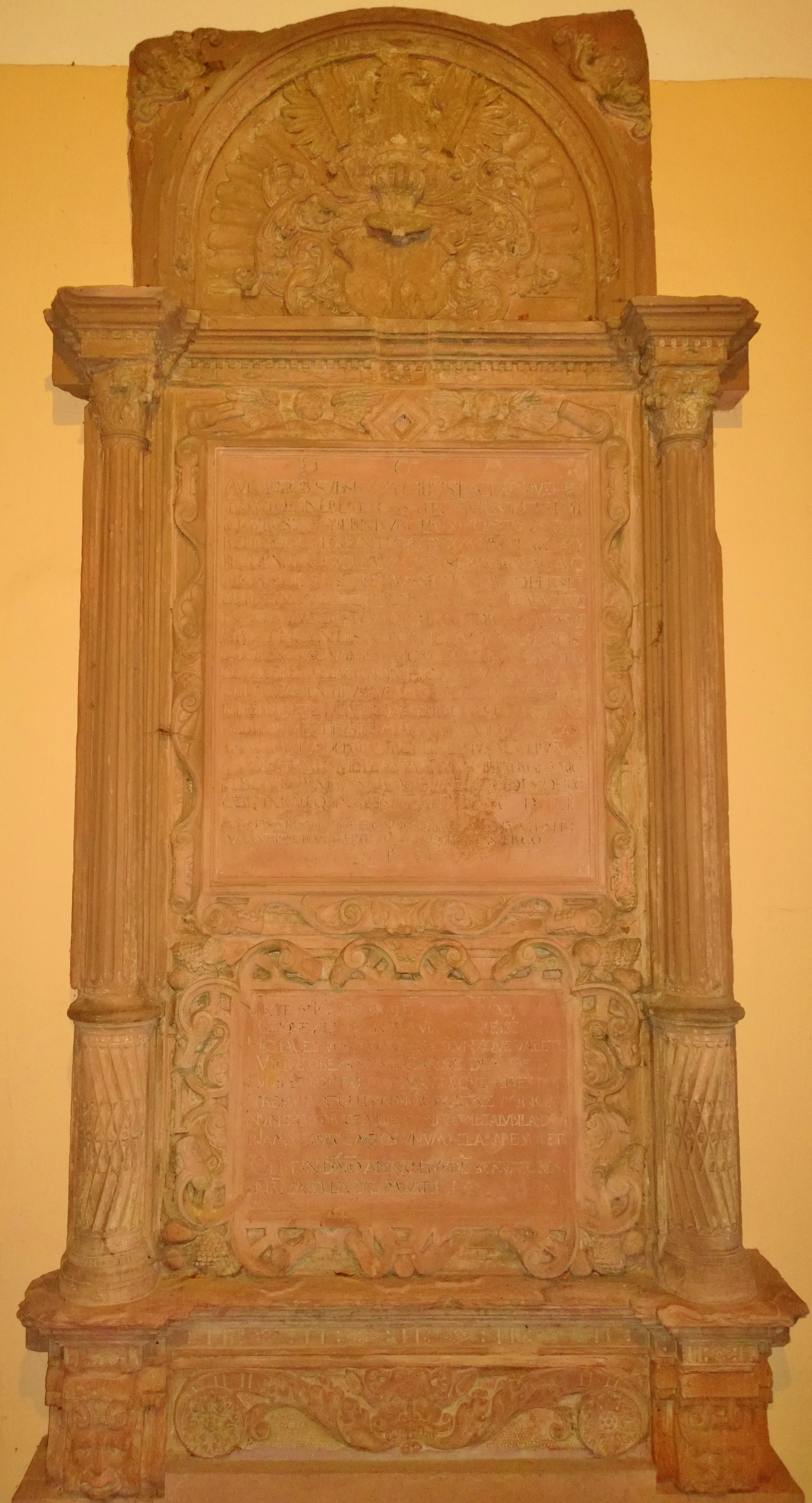 Epitaph der Gebrüder Obernburger von 1557